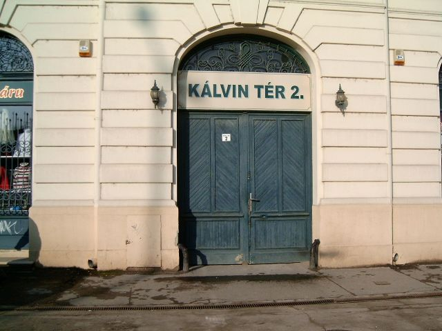 A Városi Könvtár épülete régen (Hódmezővásárhely, Kálvin tér 2.)